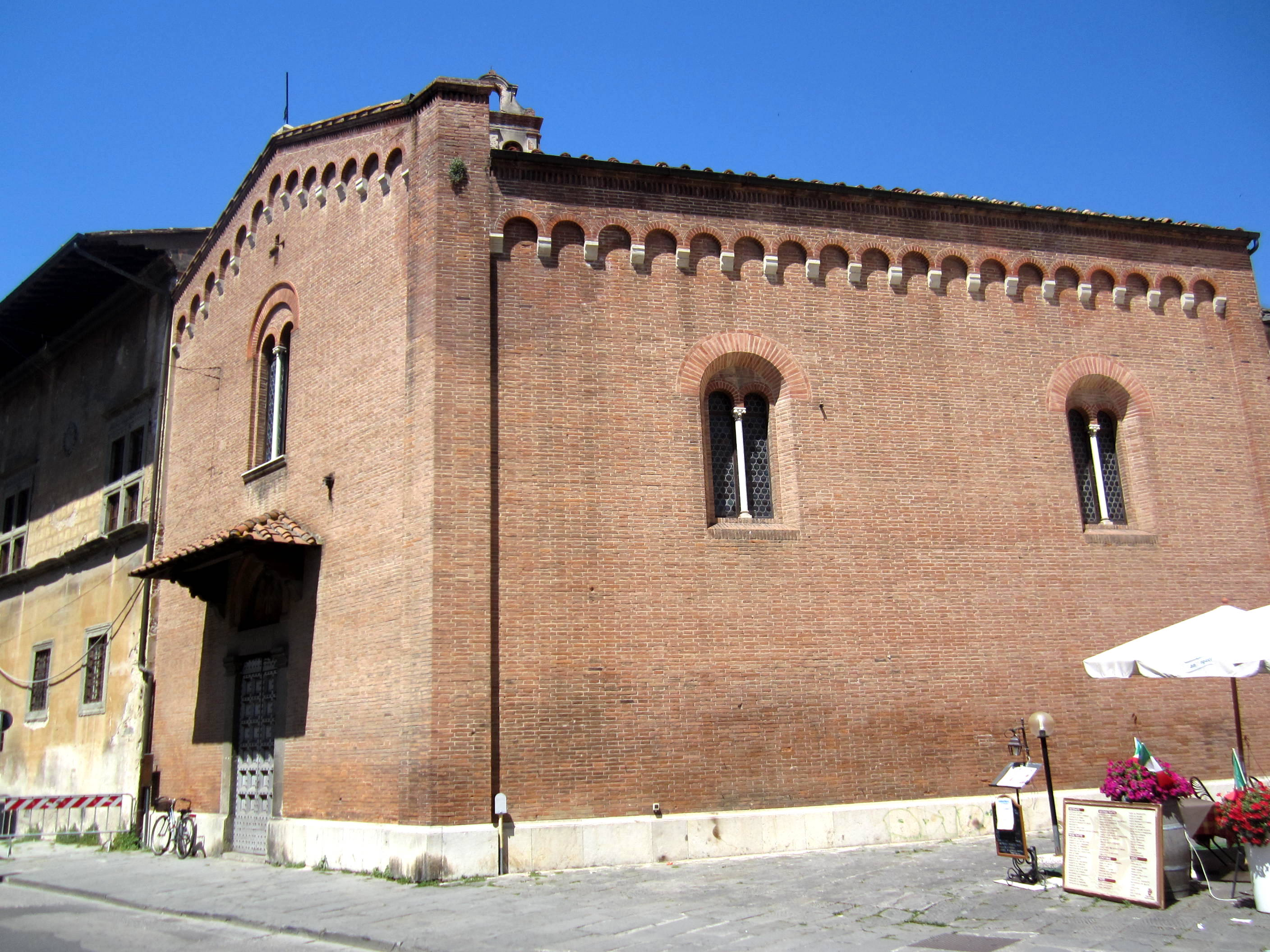 Chiesa di San Giorgio ai Tedeschi a Pisa